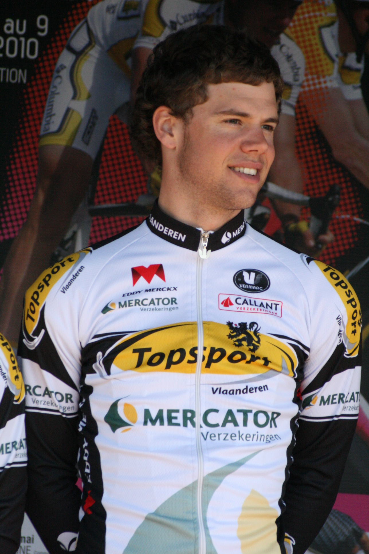 Klaas Lodewyck, lors de la présentation des équipes des 4 jours de Dunkerque 2010